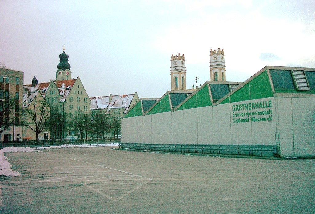 Großmarkthalle, Munich-Sendling: Gärtnerhalle with Sendling Panorama (Gotzinger Schule and towers of katholic church St. Korbinian). Image taken by Dominik Hundhammer, München, 28 February 2006.